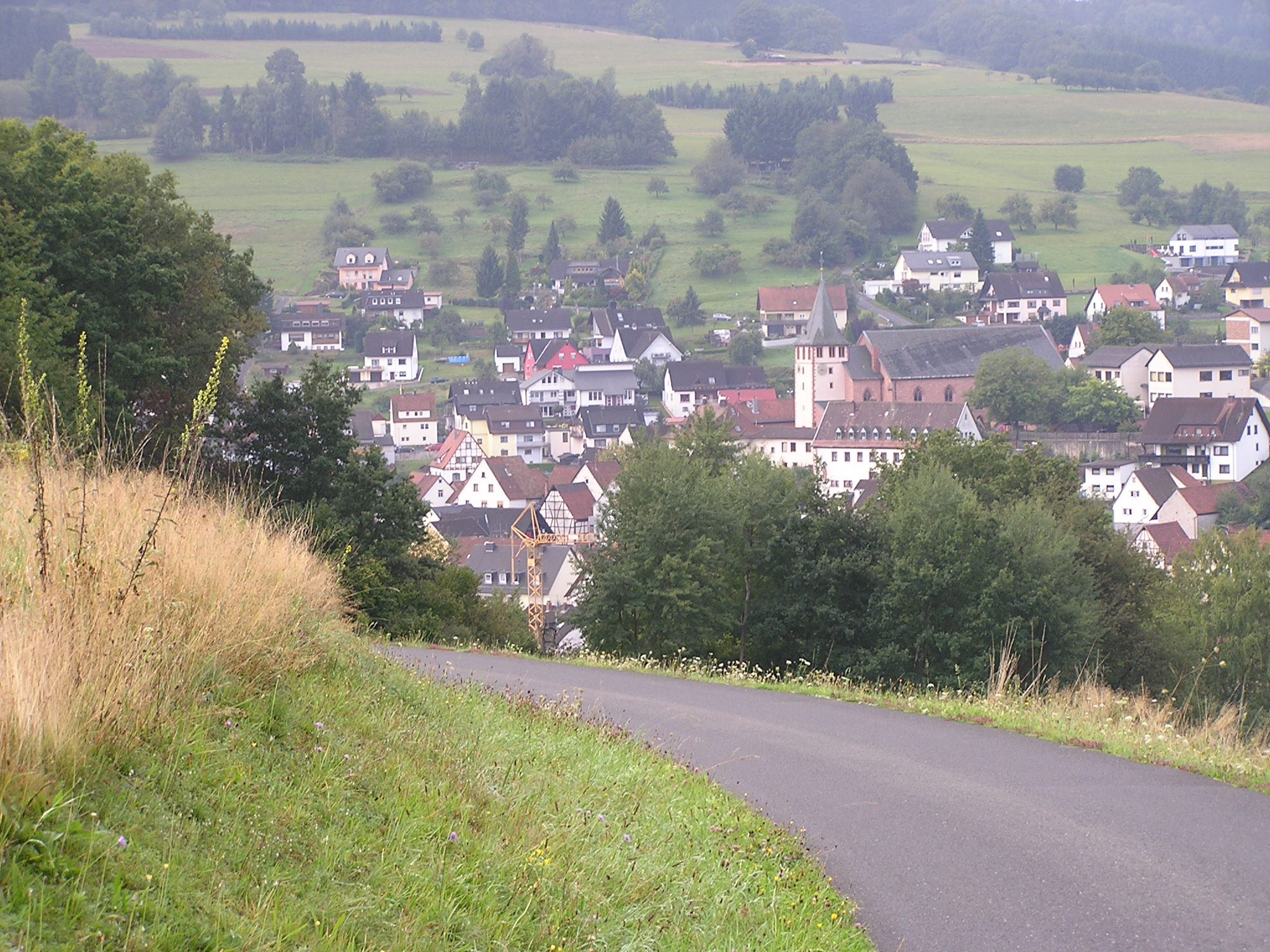 Frammersbach (Landkreis Main-Spessart, Unterfranken, Bayern, Deutschland) vom Bäckersberg